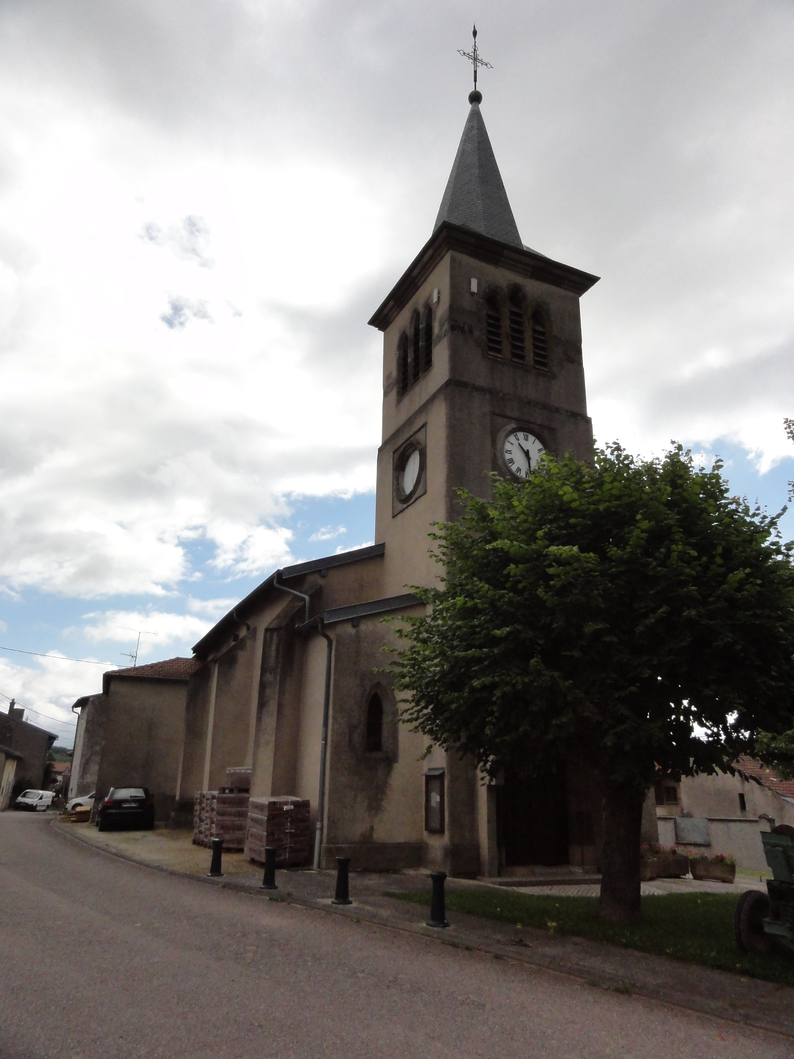 Vitrimont (M-et-M) église .